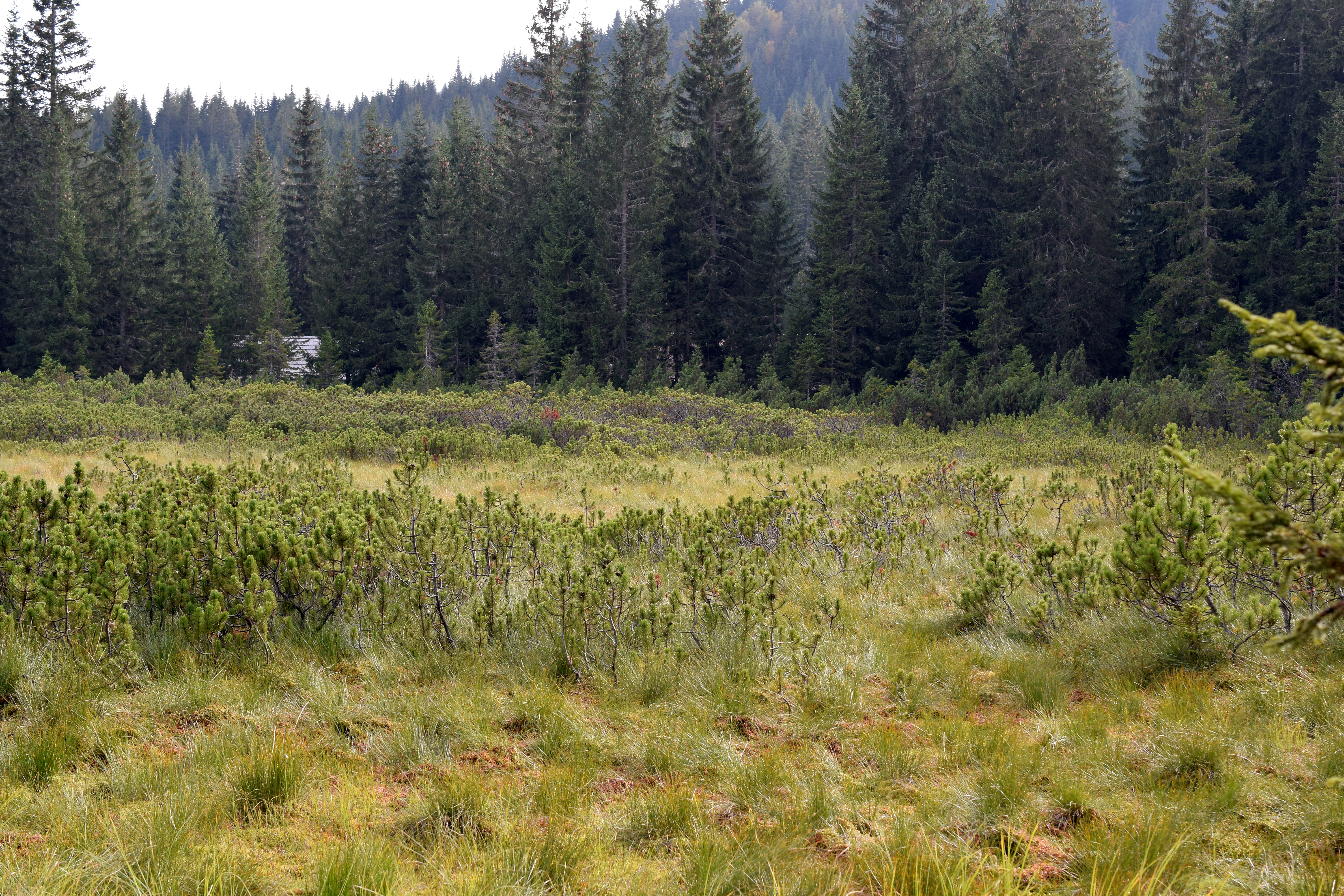 Goreljek Bog, Pokljuka, Slovenia